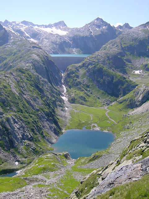 Lago dei Cavagnöö im Hintergrund, Lago Bianco im Vordergrund